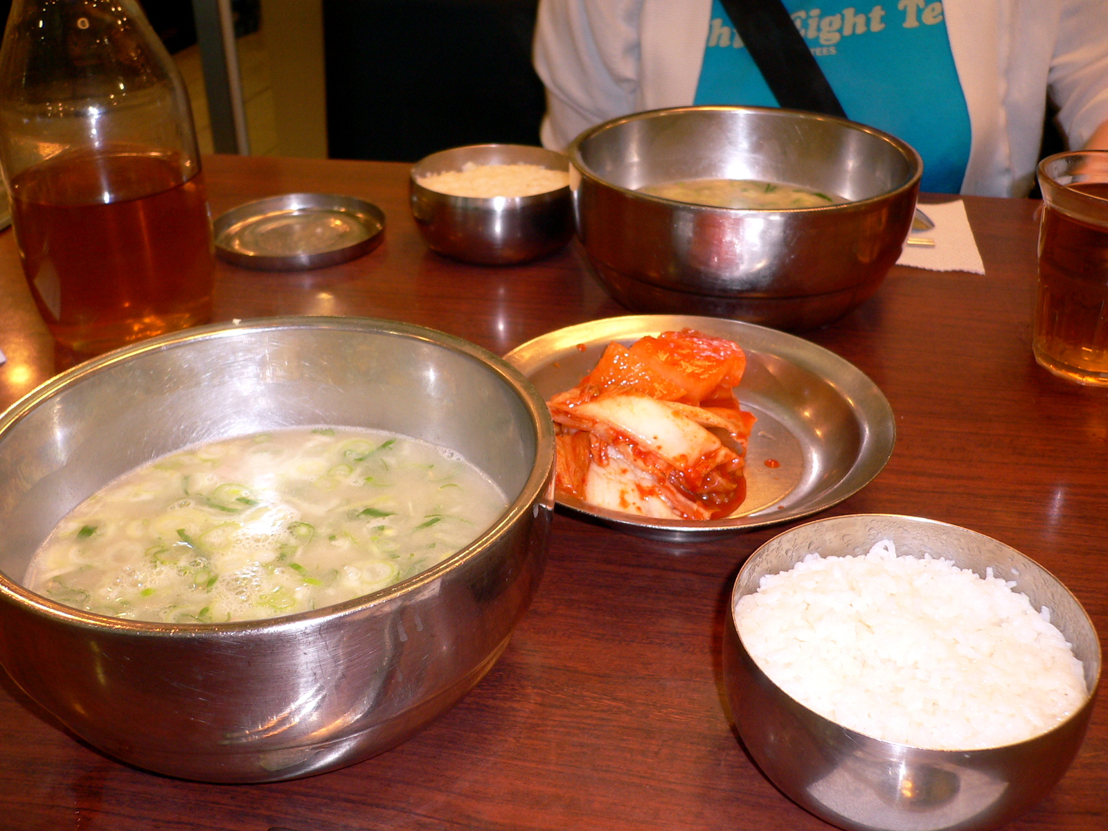 Seolleongtang